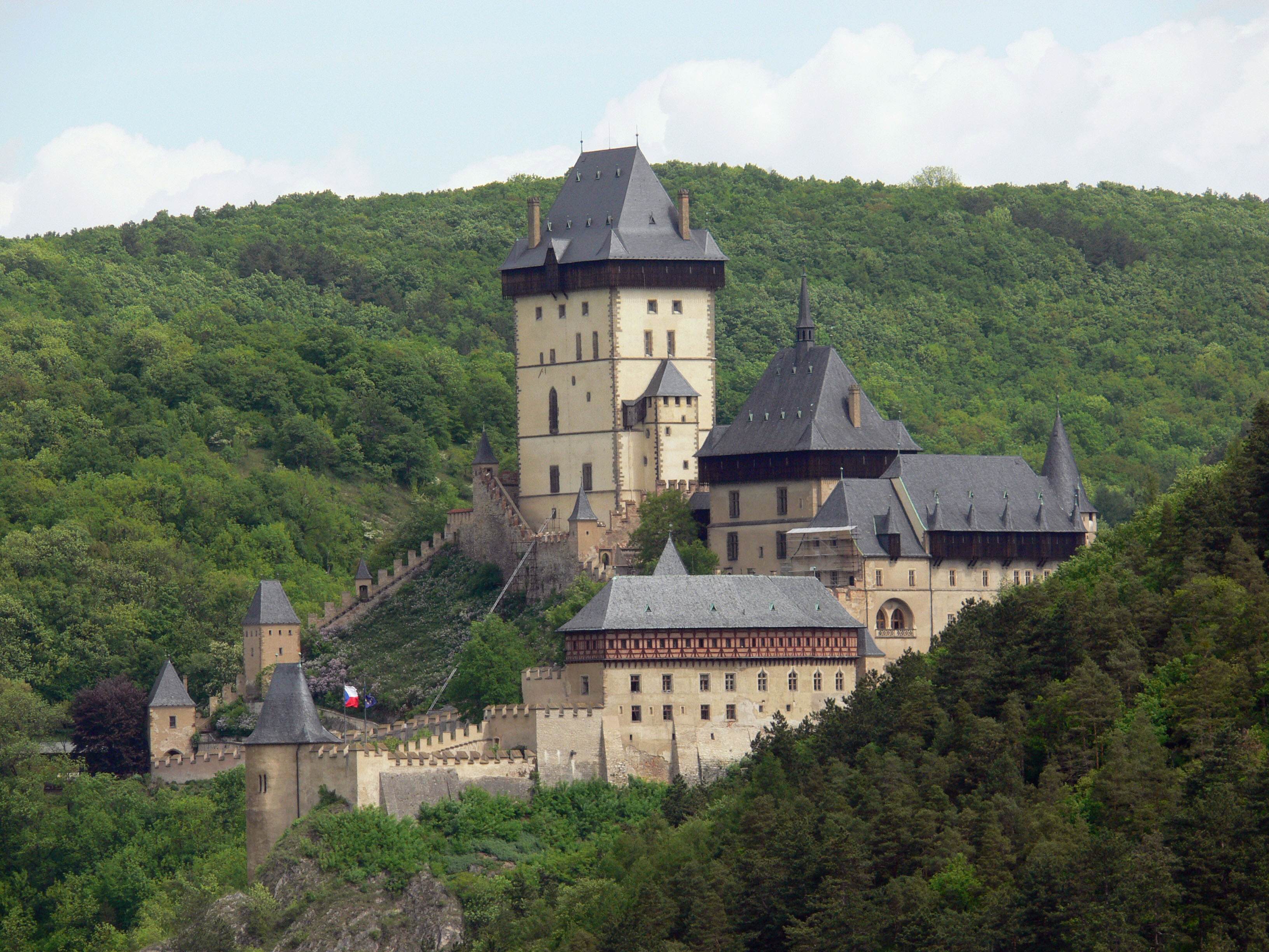 Pohled na hrad Karlštejn od jihu